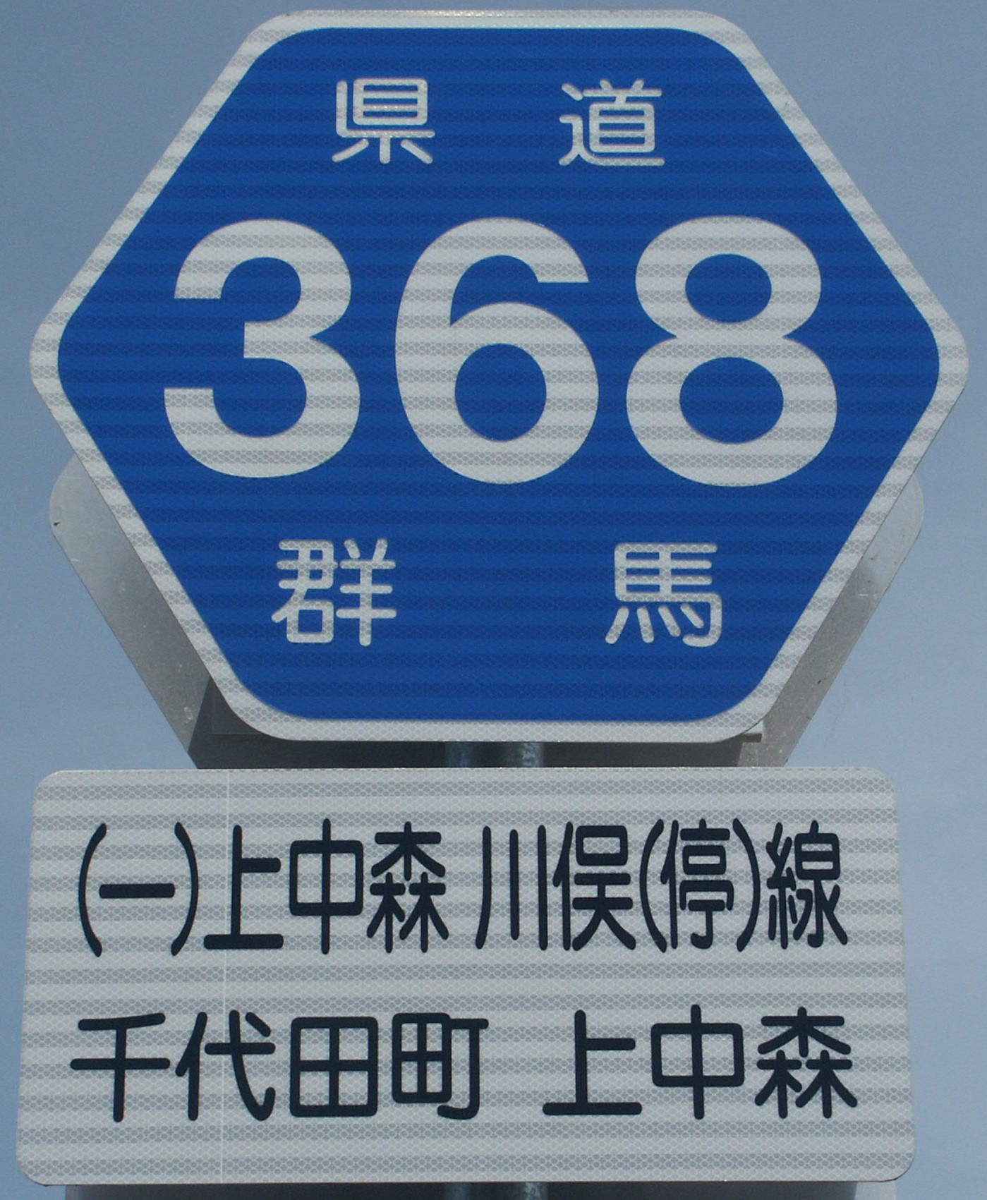 群馬県道368号線の路線番号標識